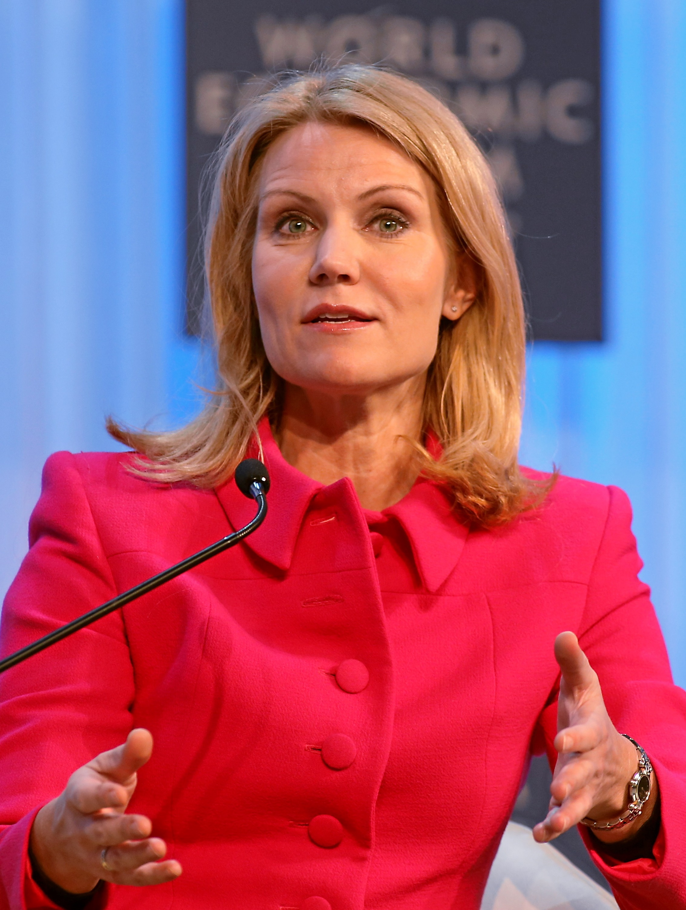 Helle Thorning-Schmidt, Prime Minister of Denmark